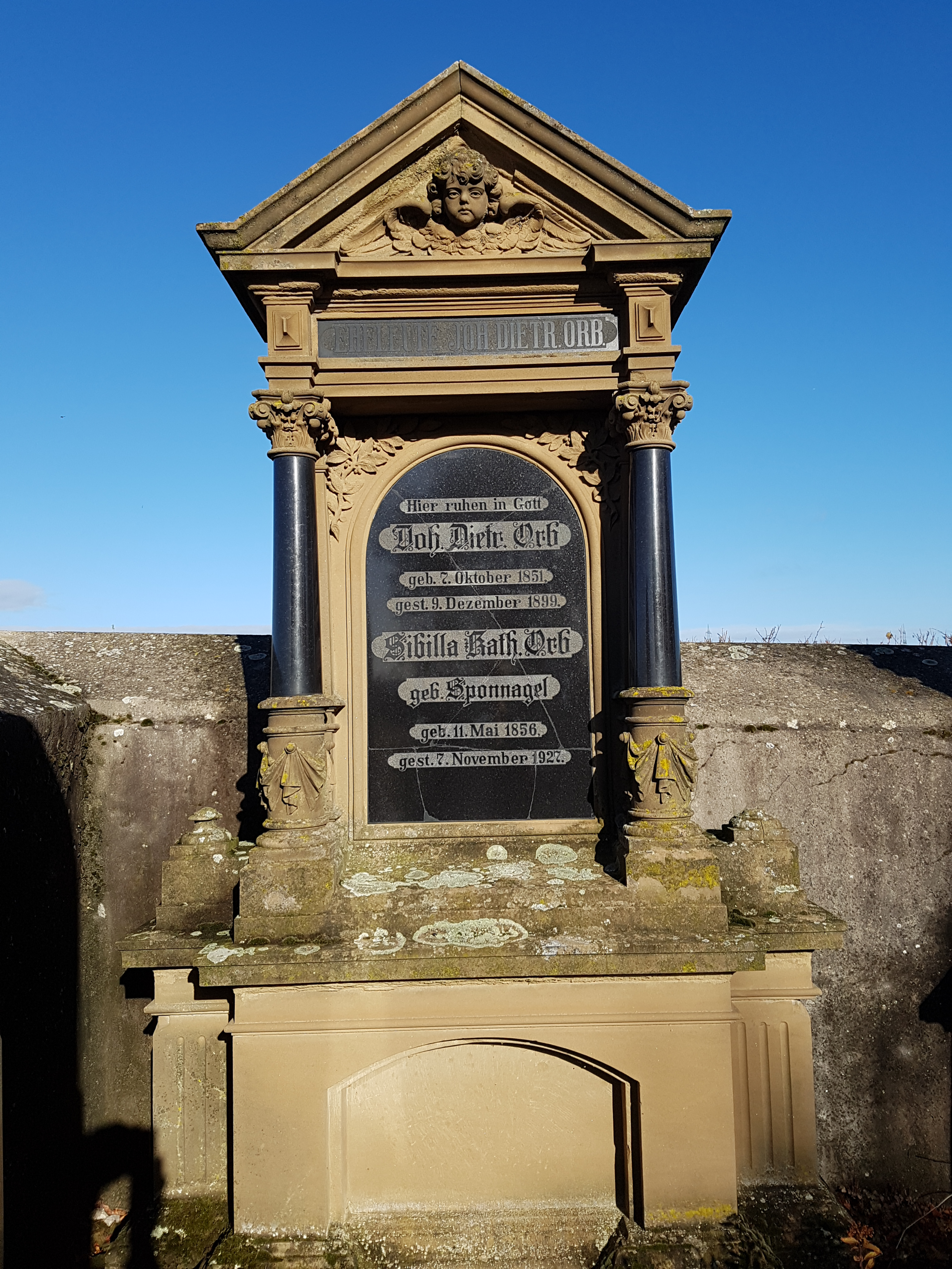 Grabmal Orb